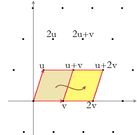 双周期函数的单元格